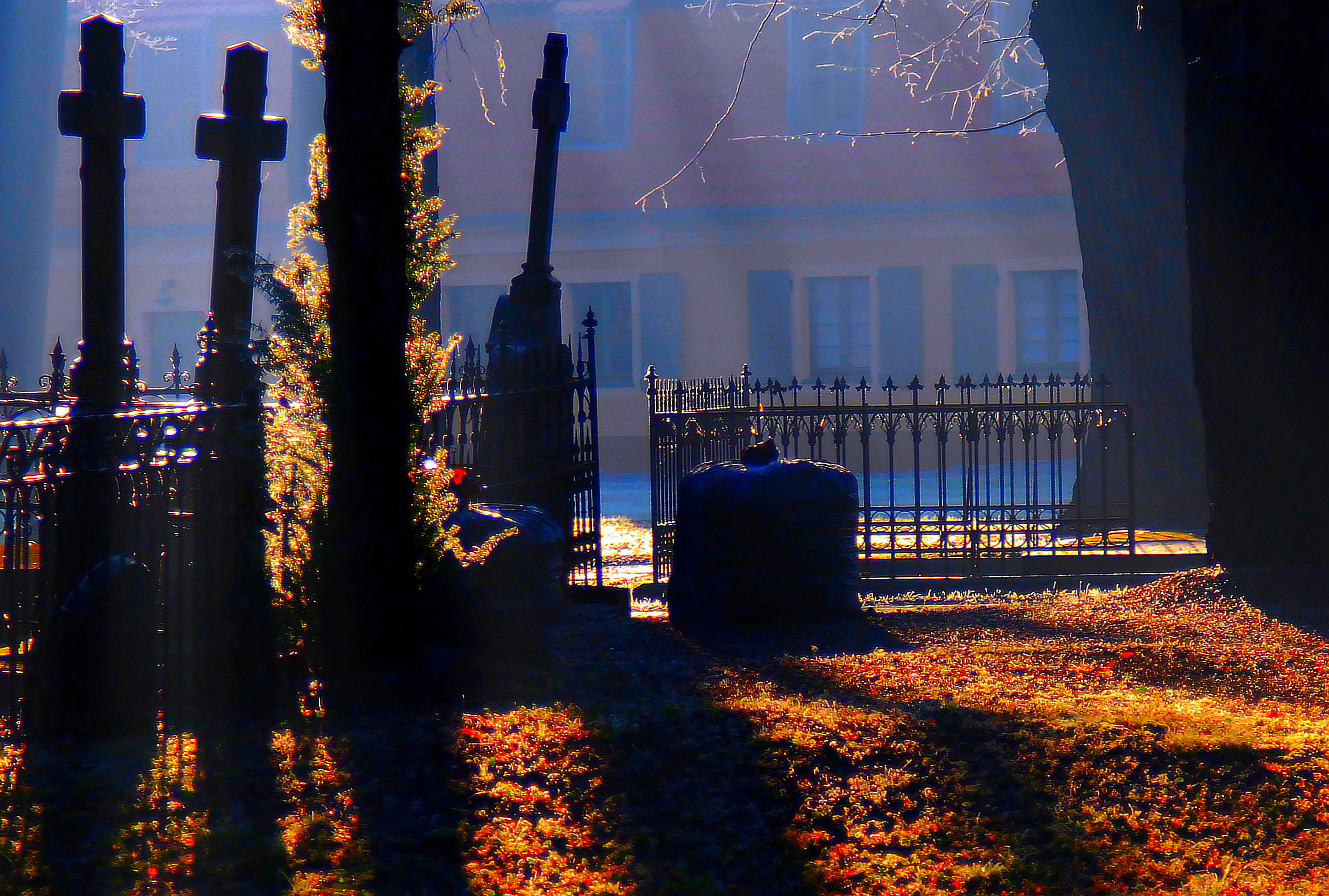 Friedhof der Friedenskirche Schweidnitz